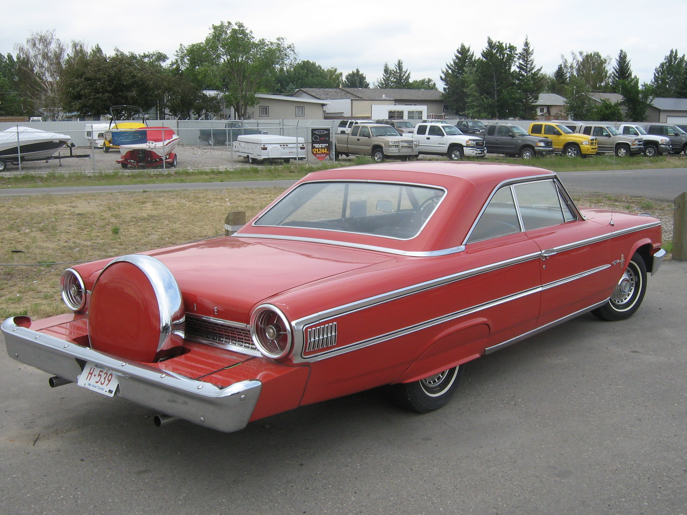 1963 Ford Galaxie 500XL